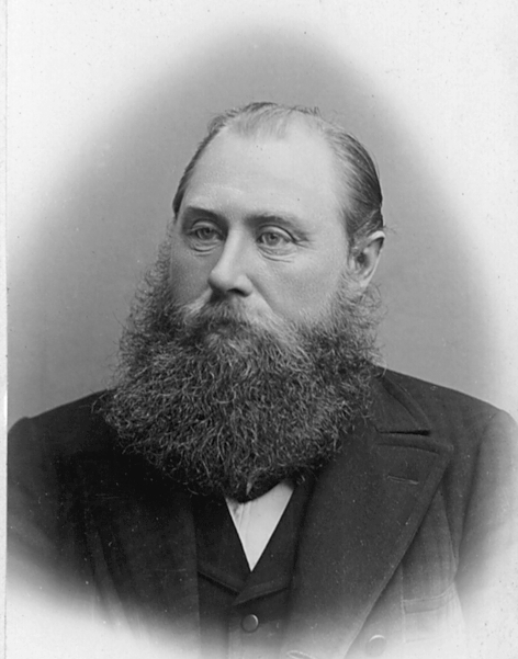 Hermann Jónsson frá Þingeyri, Iceland (f. 1858, — d. 1923) búfræðingur og Alþingismaður.